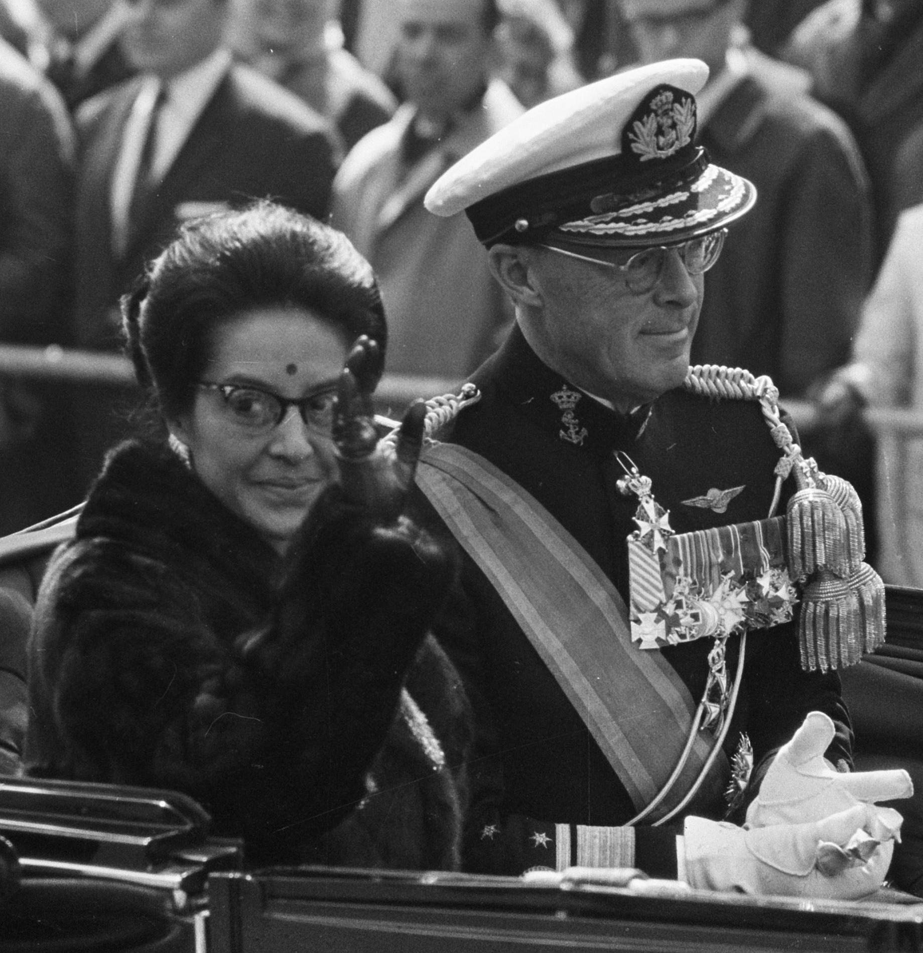 Staatsbezoek Koningin en Koning van Nepal, Koningin van Nepal en prins Bernhard in rijtuig op weg naar Paleis op de Dam